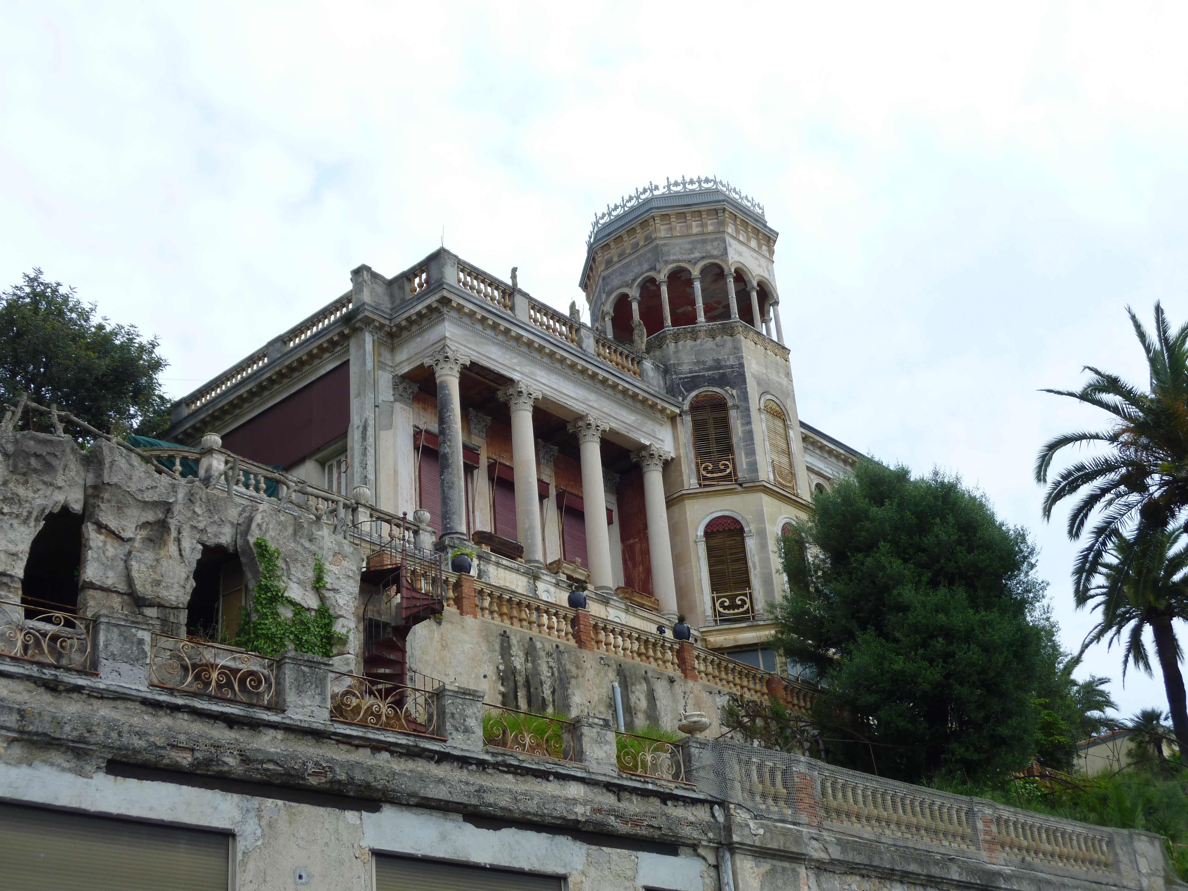 Villa Beau Site, (Nice, Alpes-Maritimes, France) .